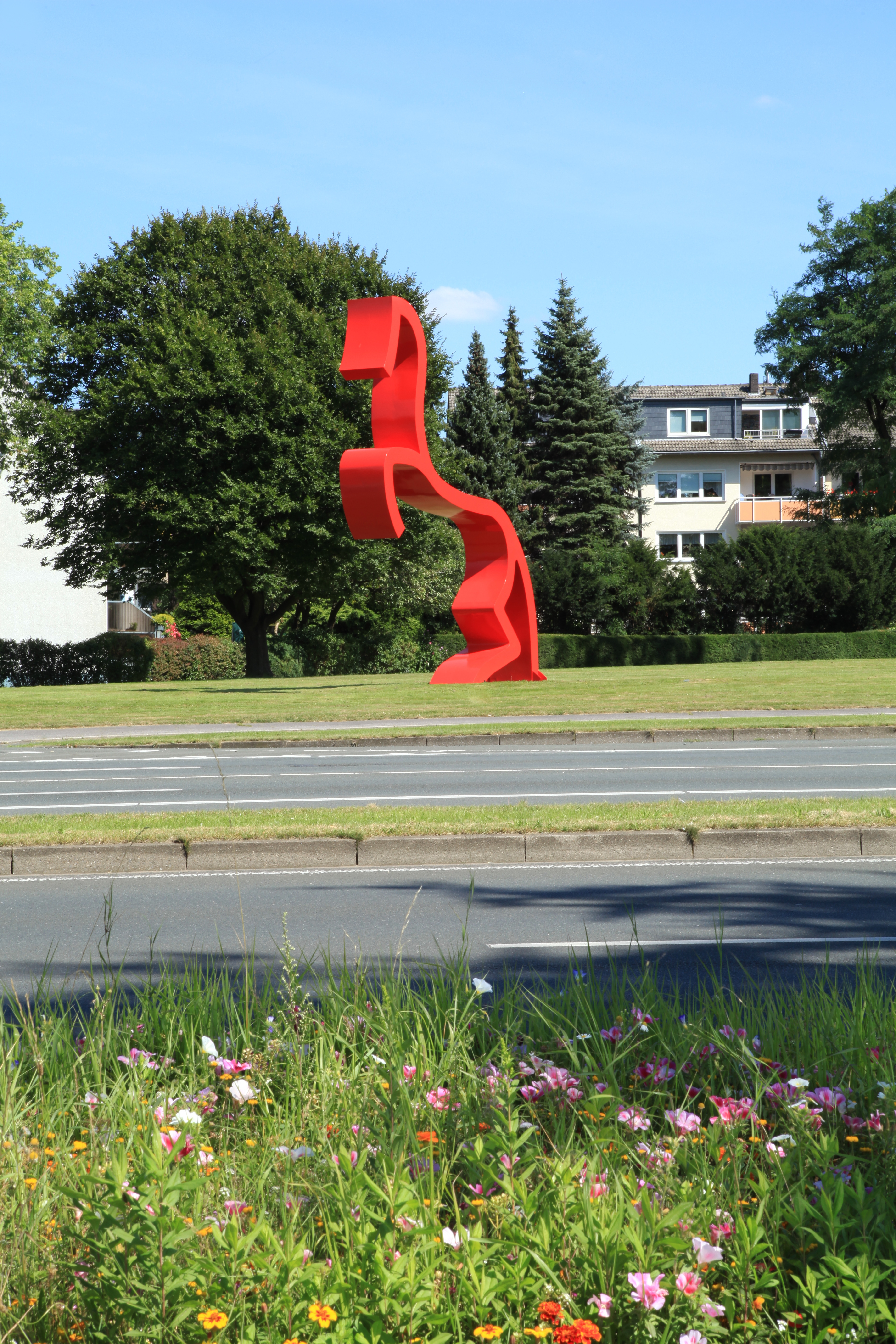 Rotes Pferd von Johann Hinger an der Kirchhellener Straße (Ecke Schubertstraße) in Bottrop